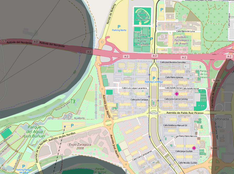 Mapa del distrito Actur Rey Fernando en Zaragoza.